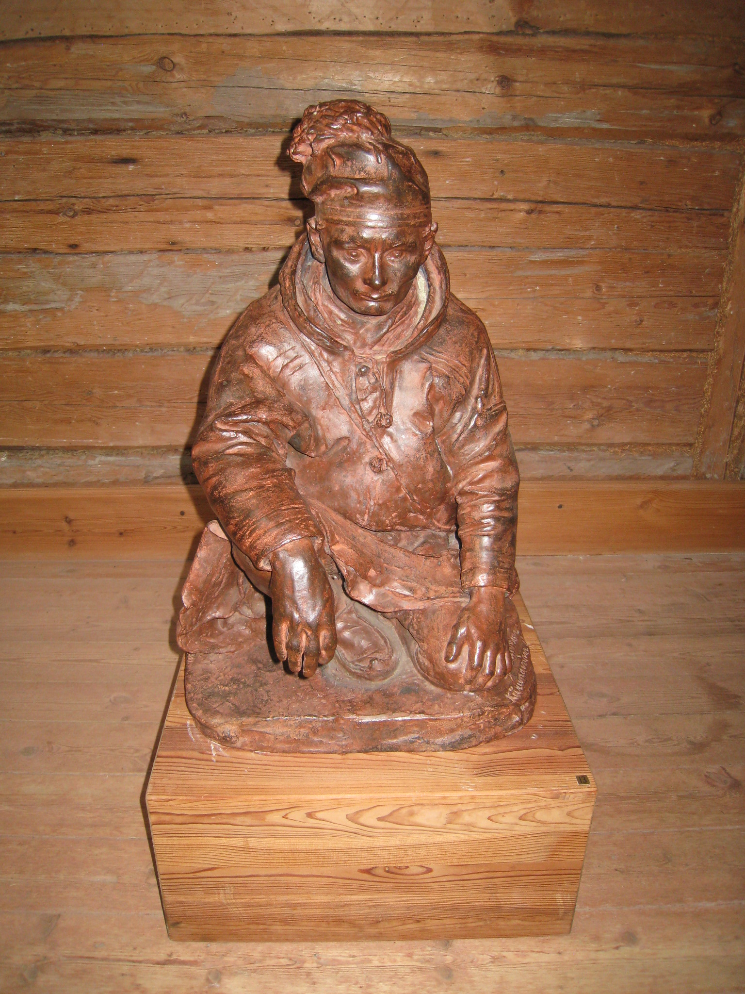 Interiör Christian Erikssons ateljé, Oppstuhage, Rackstadmuseet, Arvika, Värmland. Skulpturen föreställer Sittande same, signerad och daterad Chr. Eriksson Kiirunavaara 1909, gjutarstämpel Herman Bergman Fud, patinerad brons, höjd 21 cm, föreställer samen Per Kuhmoinen.